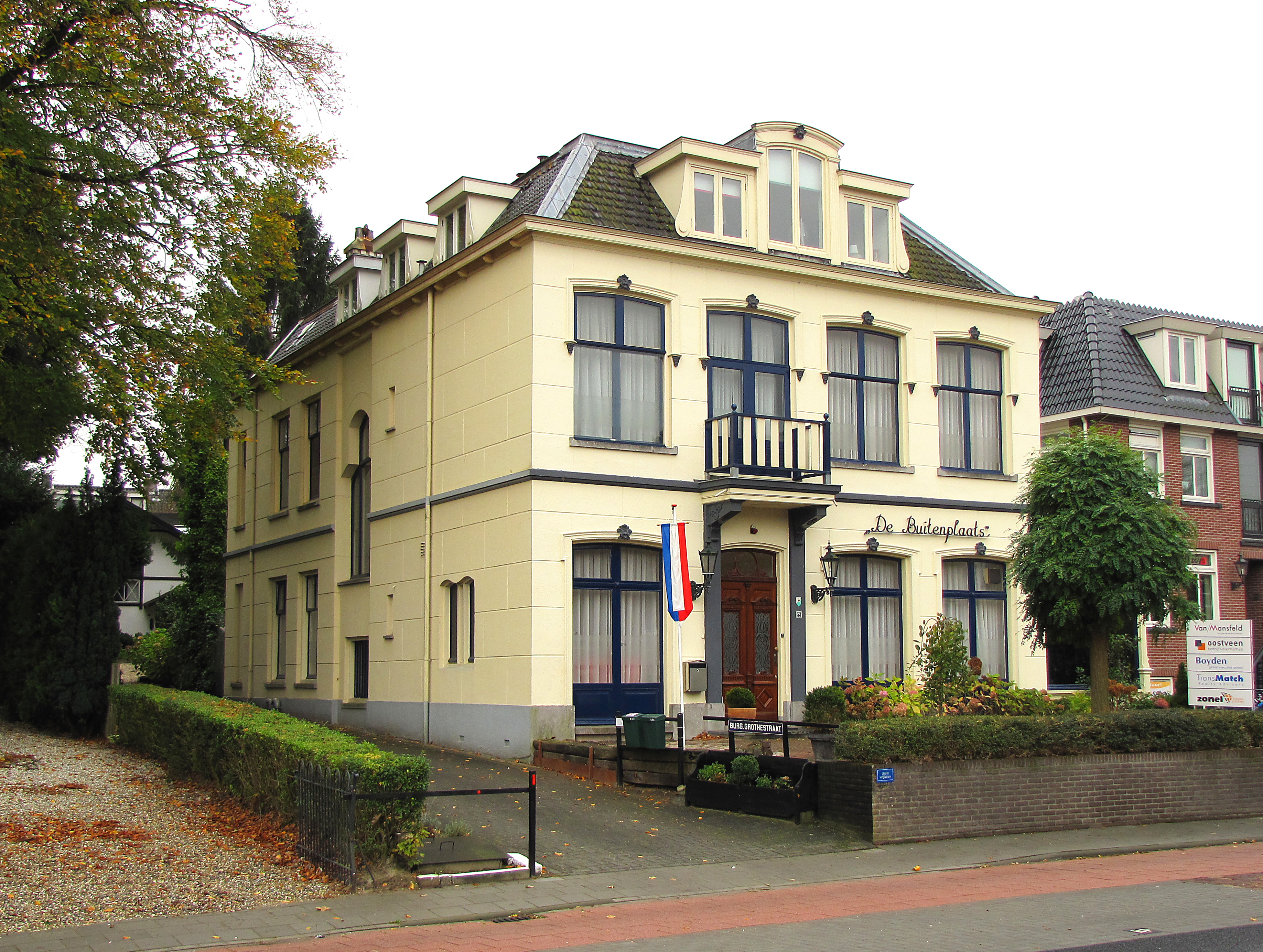 Noord- en oostgevel van "De Buitenplaats", voorheen buitenplaats "Noordereng".